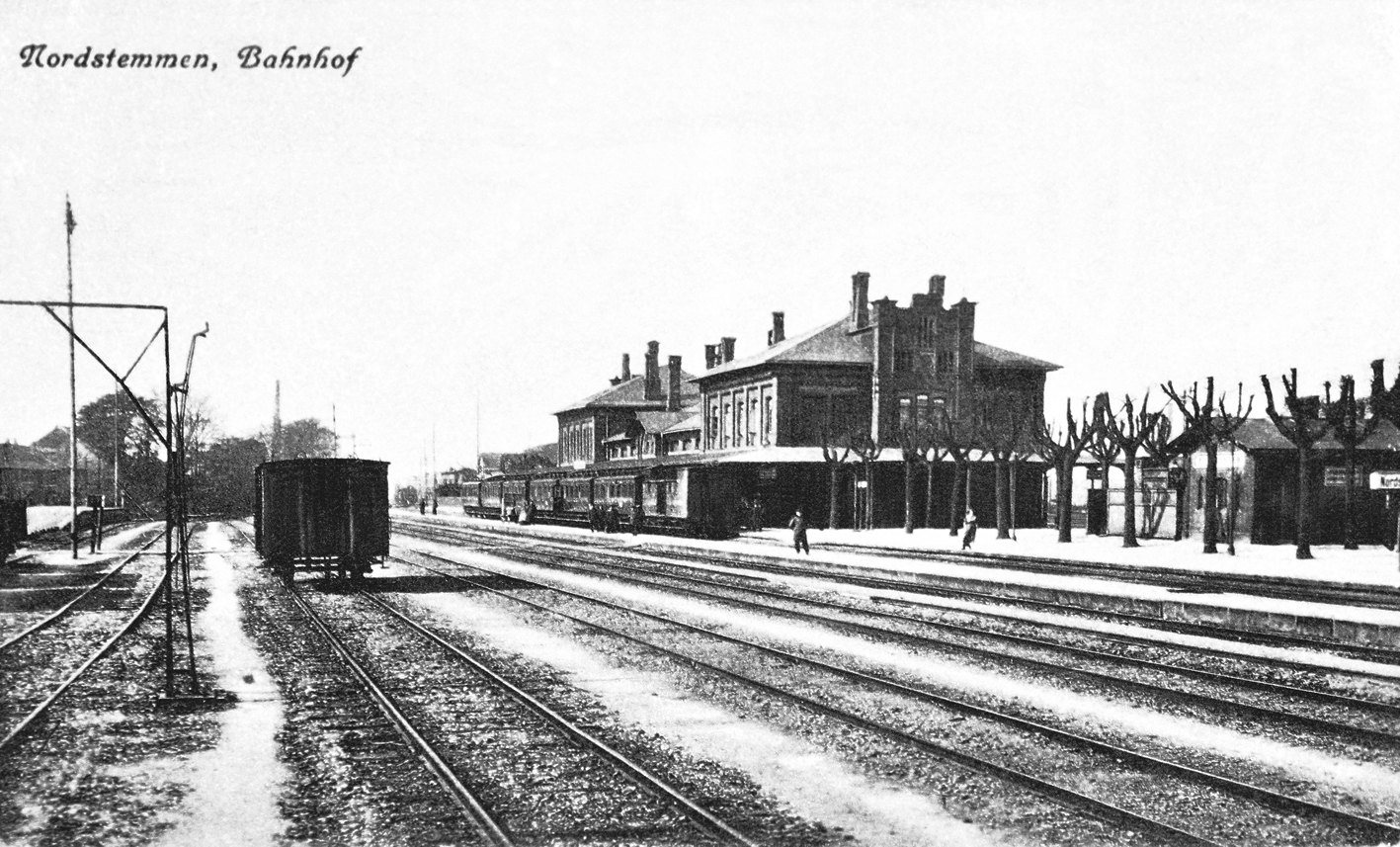 Blick im Jahr 1915 auf den Bahnhof Nordstemmen, Niedersachsen, Deutschland.